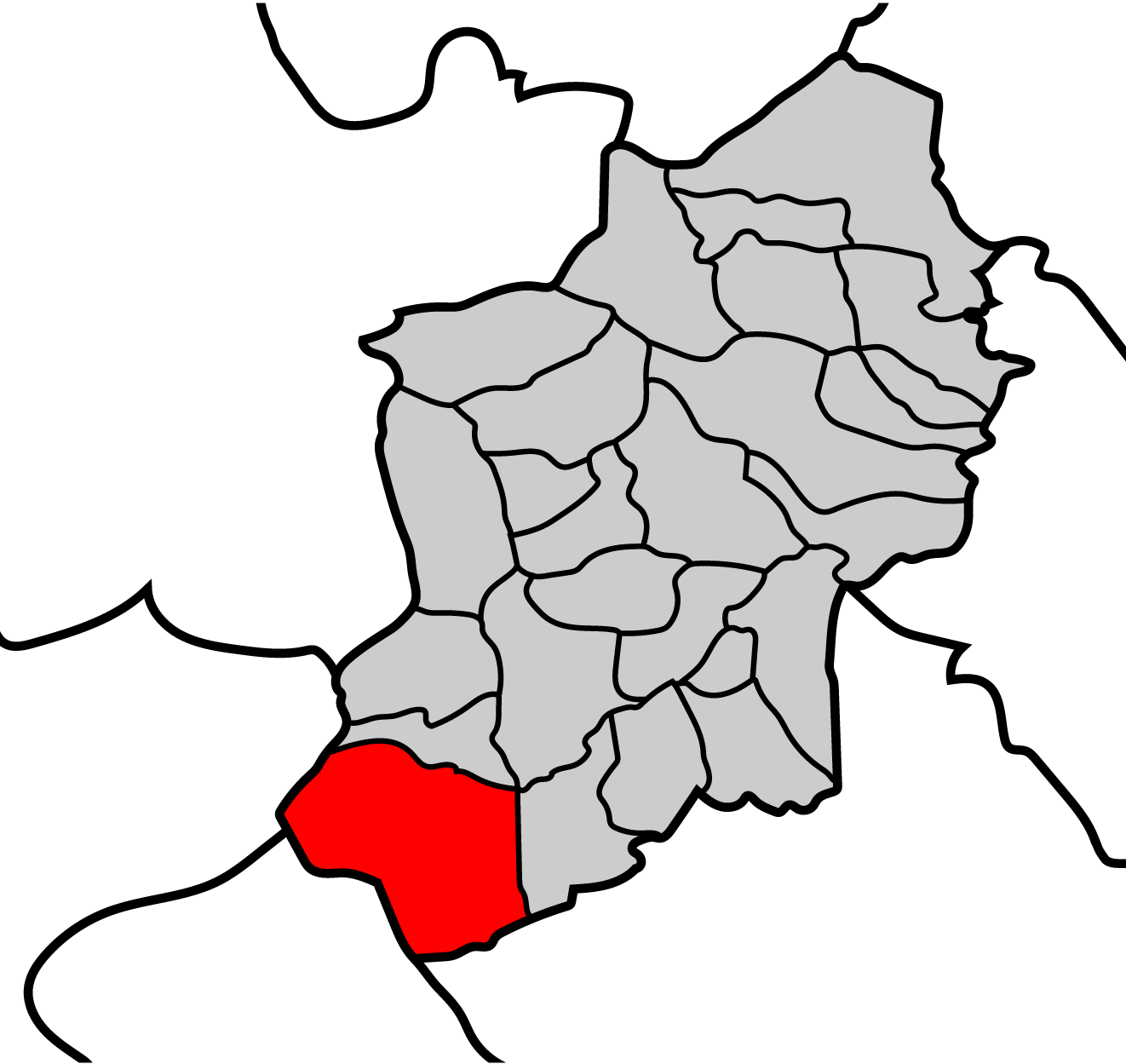 Mapa de la parroquia de Guilfrei ayuntamiento de Becerreá